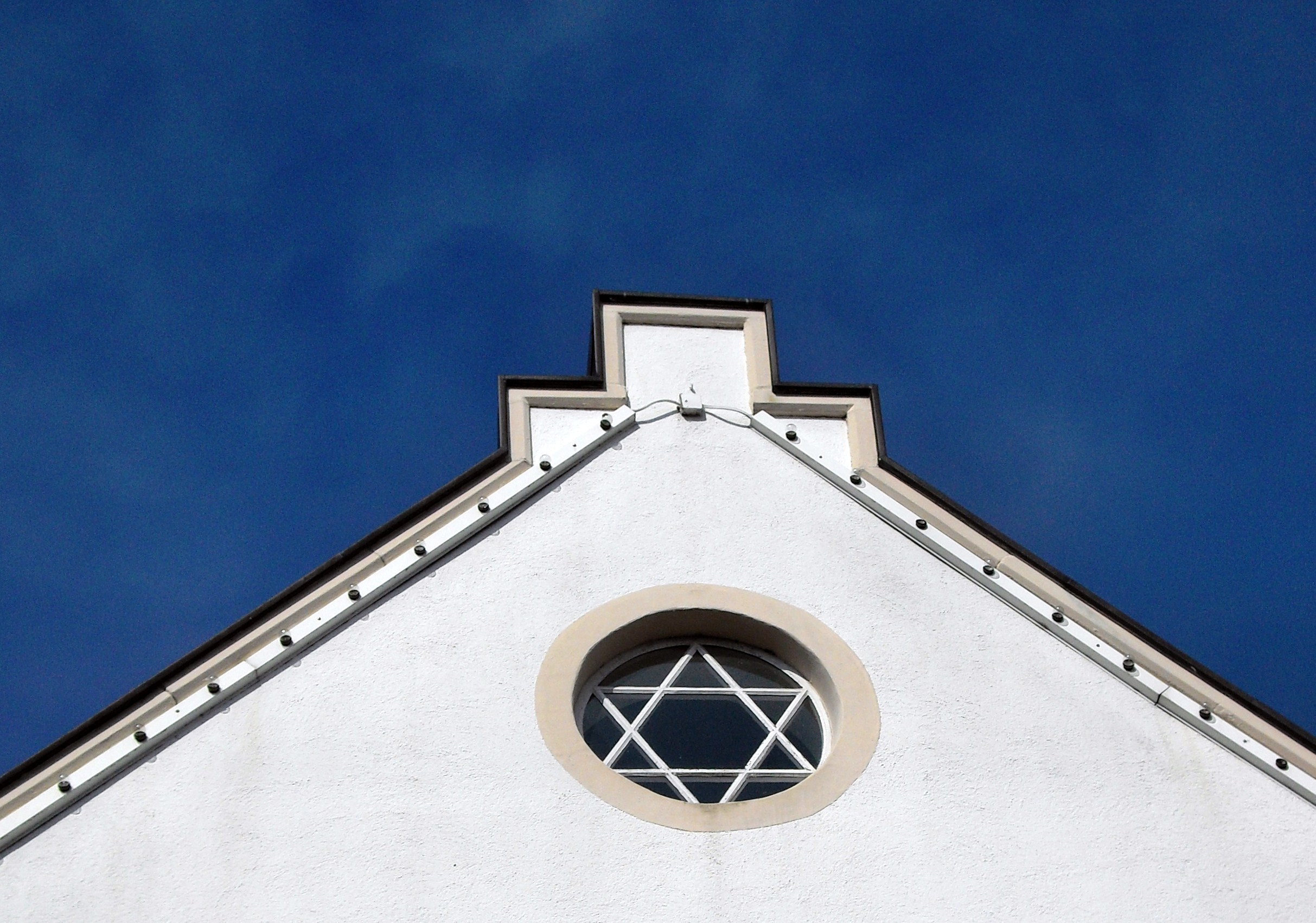 Davidstern im Giebelfenster eines jeverschen Hauses (Ausschnitt)